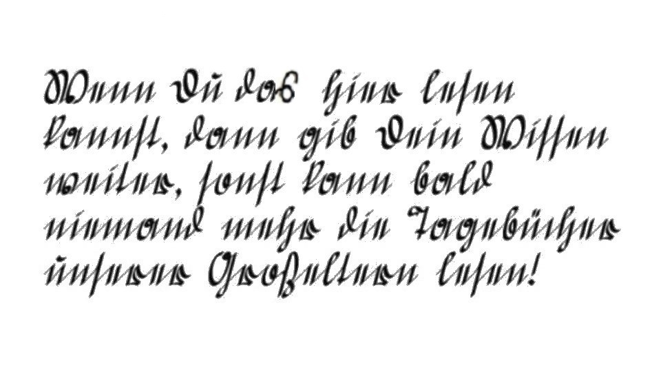 Aufruf die Kenntnis der deutschen Schrift weiterzugeben. Text: Wenn Du das hier lesen kannst, dann gib Dein Wissen weiter, sonst kann bald niemand mehr die Tagebücher unserer Großeltern lesen!